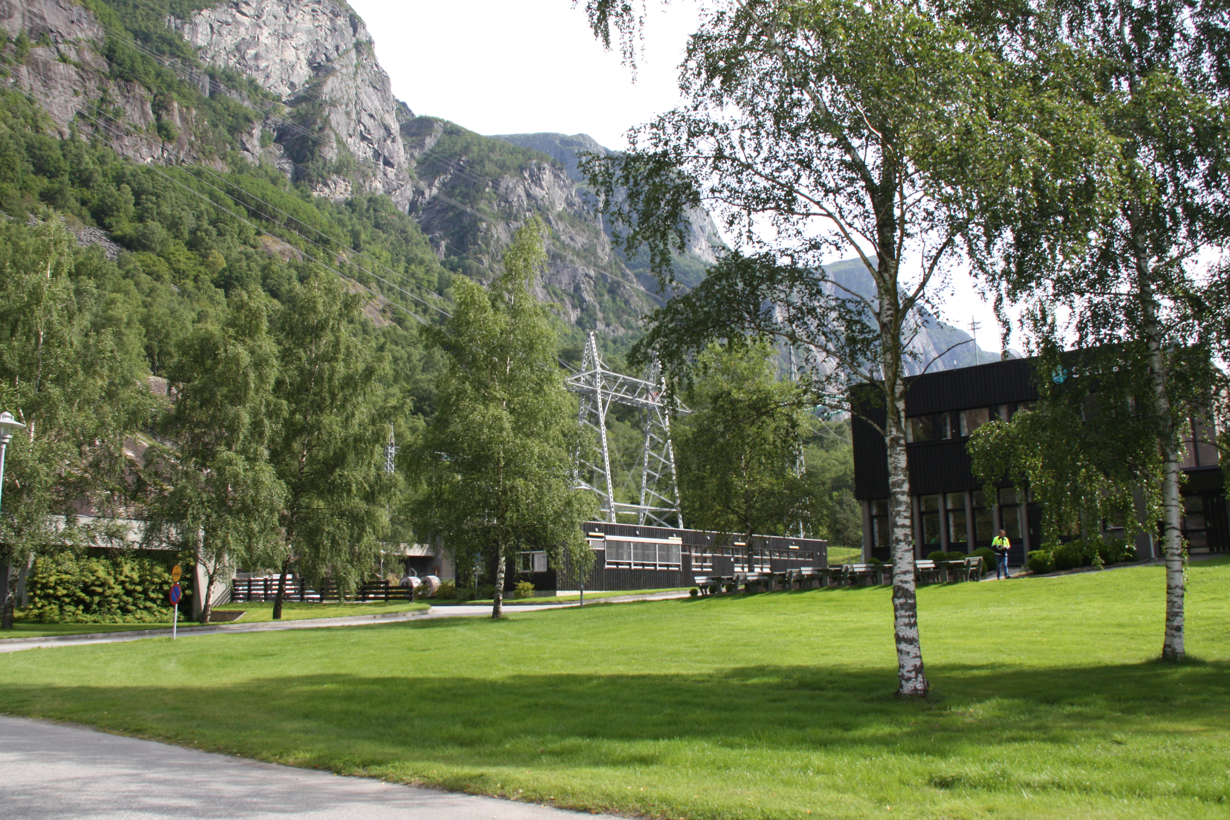 BM1(?) i Simadalen